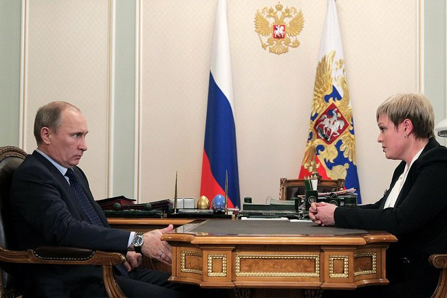 Рабочая встреча президента Владимира Путина с губернатором Мурманской области Мариной Ковтун